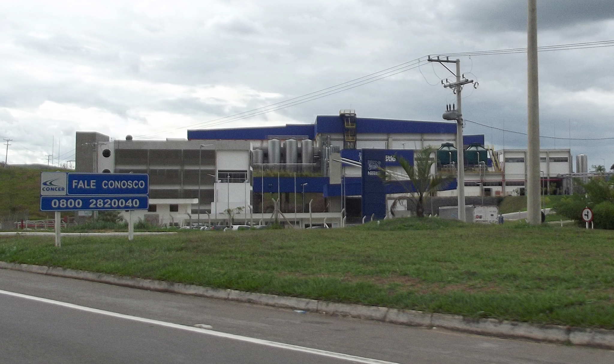 Fábrica da Nestlé em Tres Rios, RJ em março de 2014.